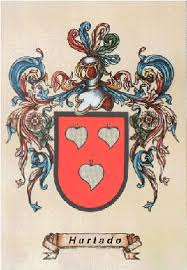 Primer Escudo del apellido Hurtado